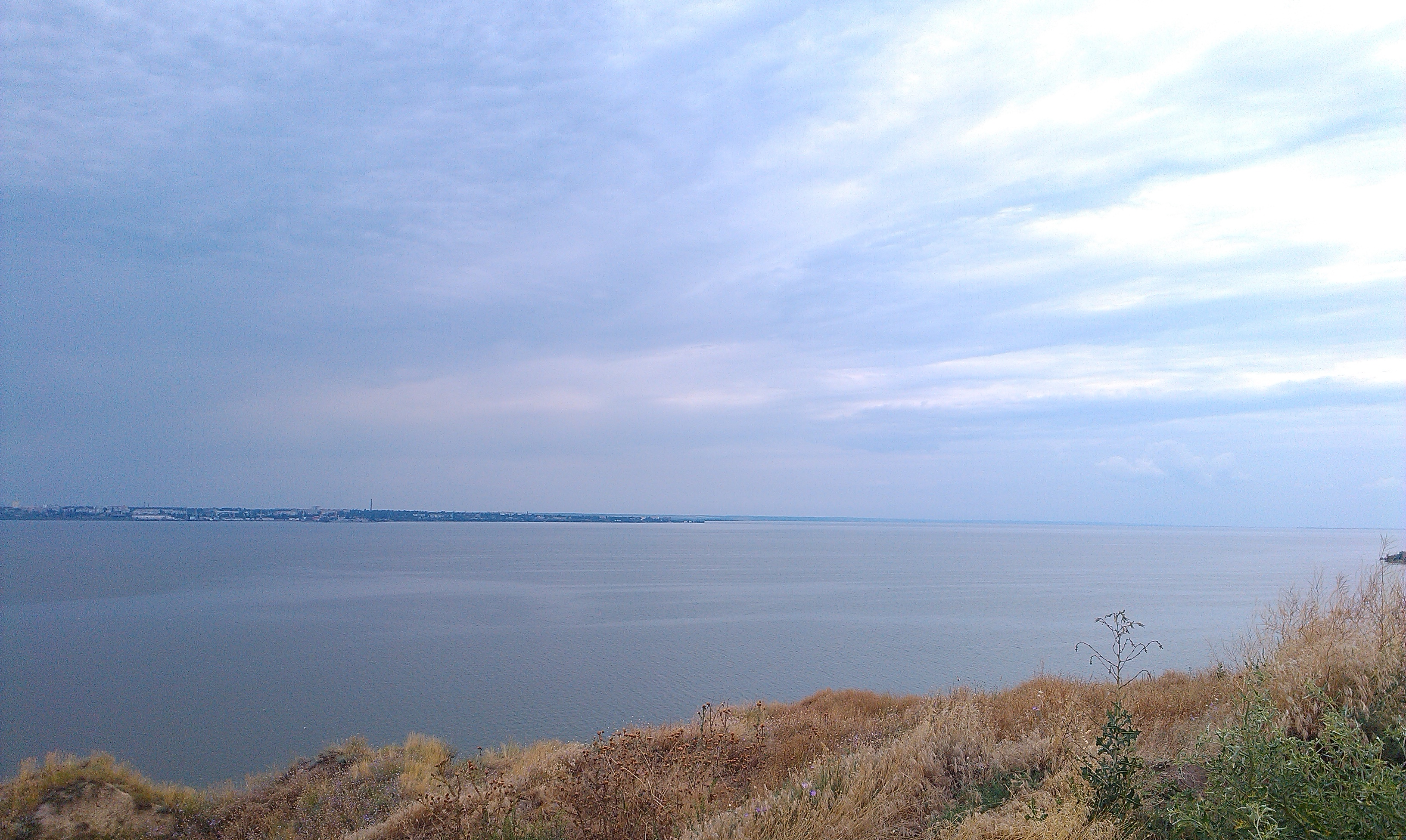 На протилежному боці лиману знаходиться місто Білгород-Дністровський, Аккерманська фортеця та побратим Ніконія - поліс Тіра.